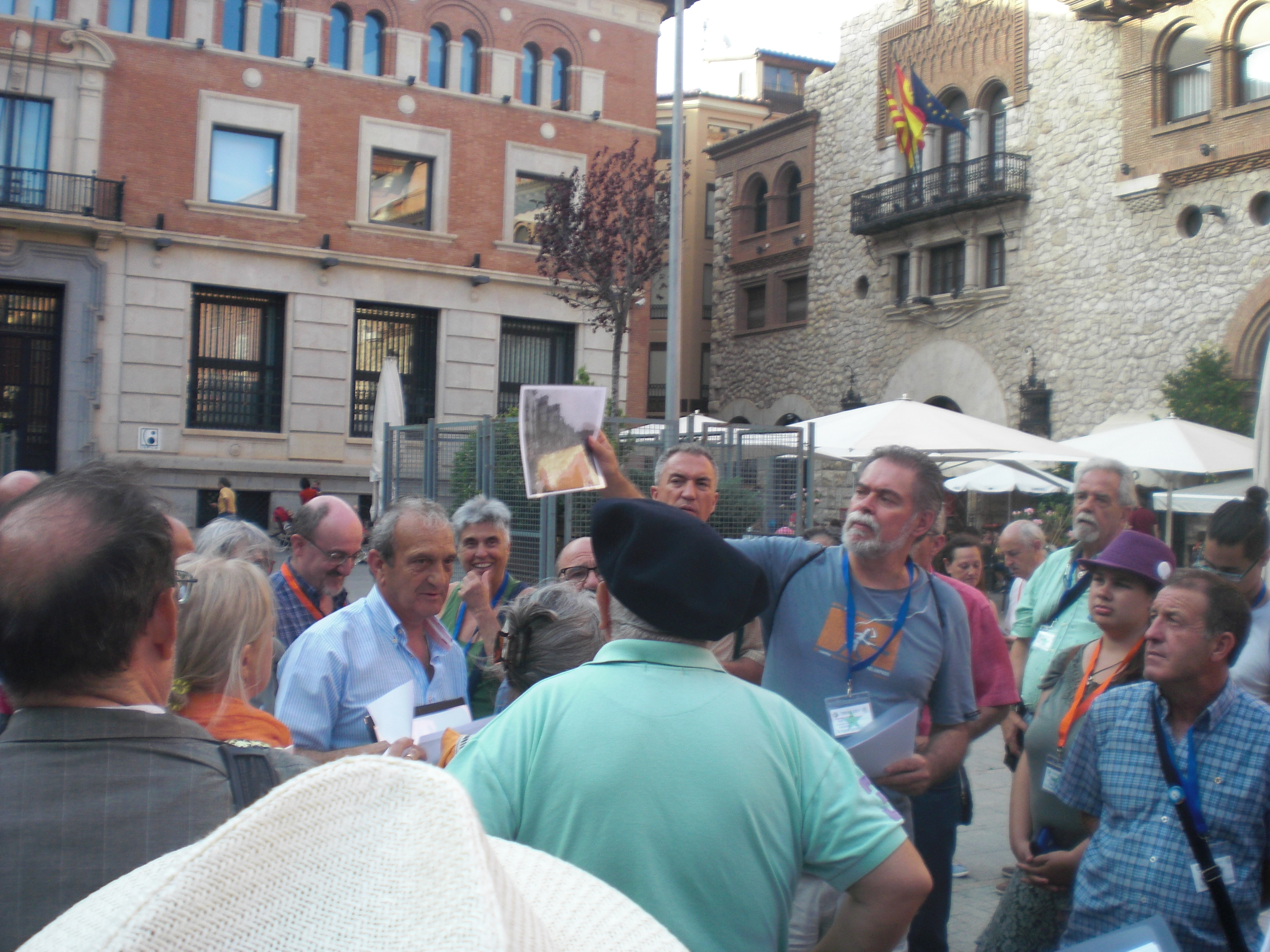 Kongresanoj en Teruelo